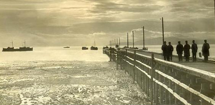 تصویری از اسکله بندر آستارا در سال ۱۲۹۰ شمسی